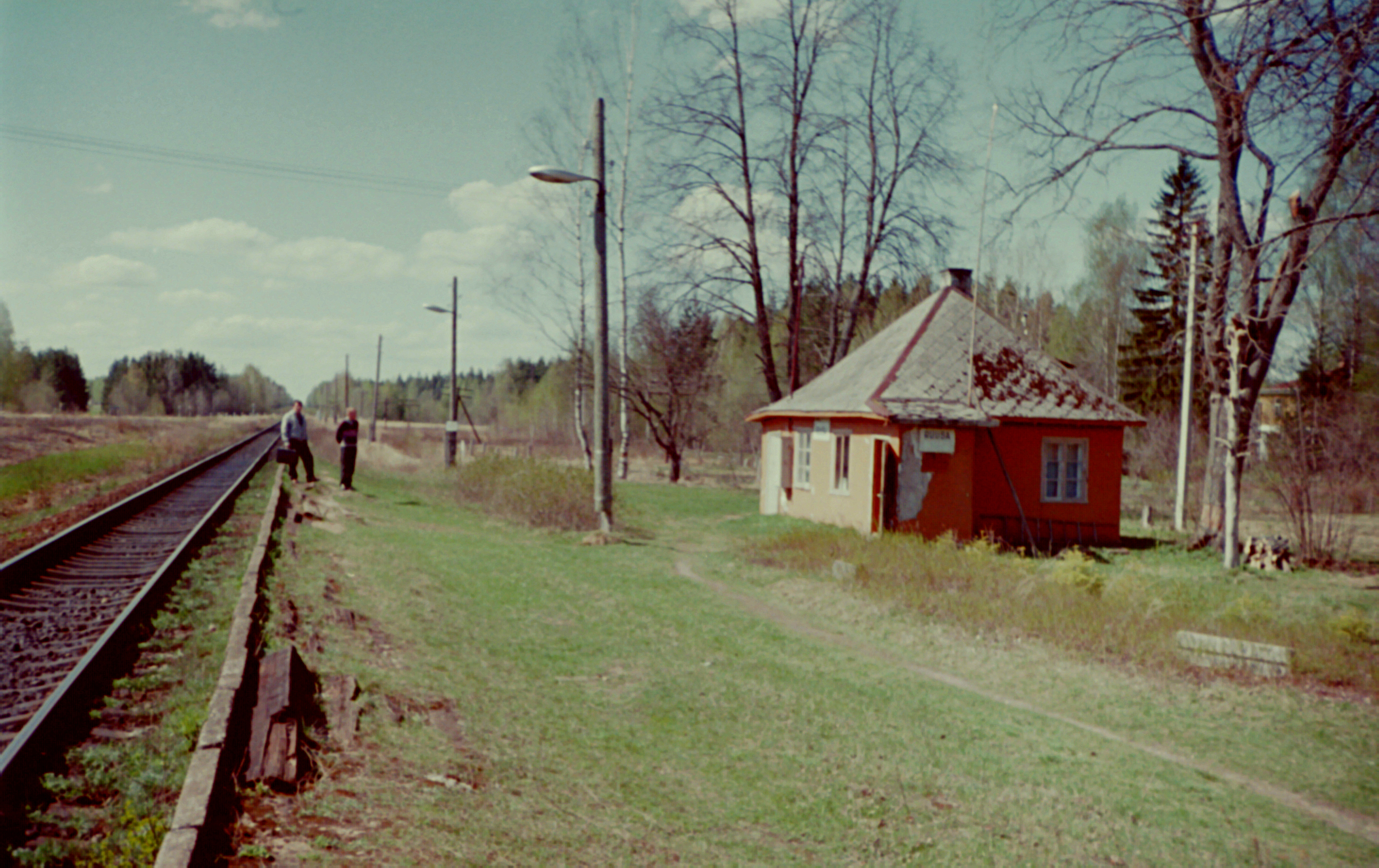 Ruusa raudteepeatuskoht